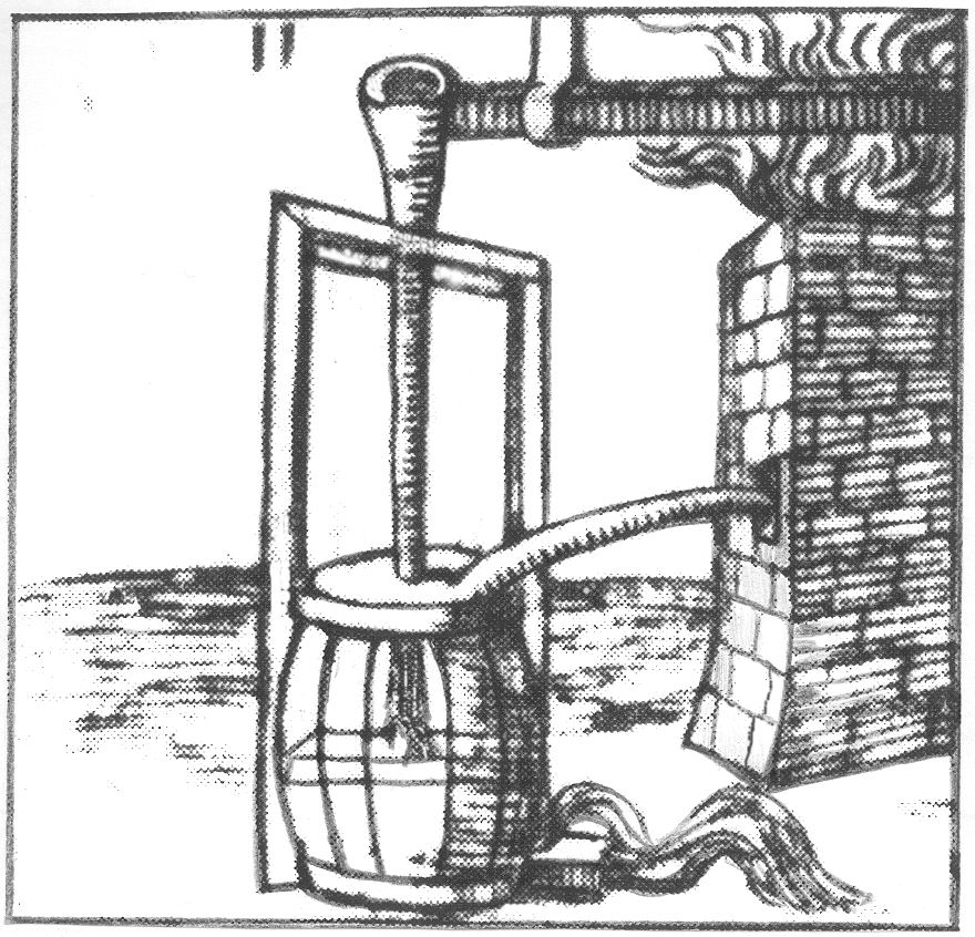 Pratica Minerale. Tromba applicata a un forno da ghisa.